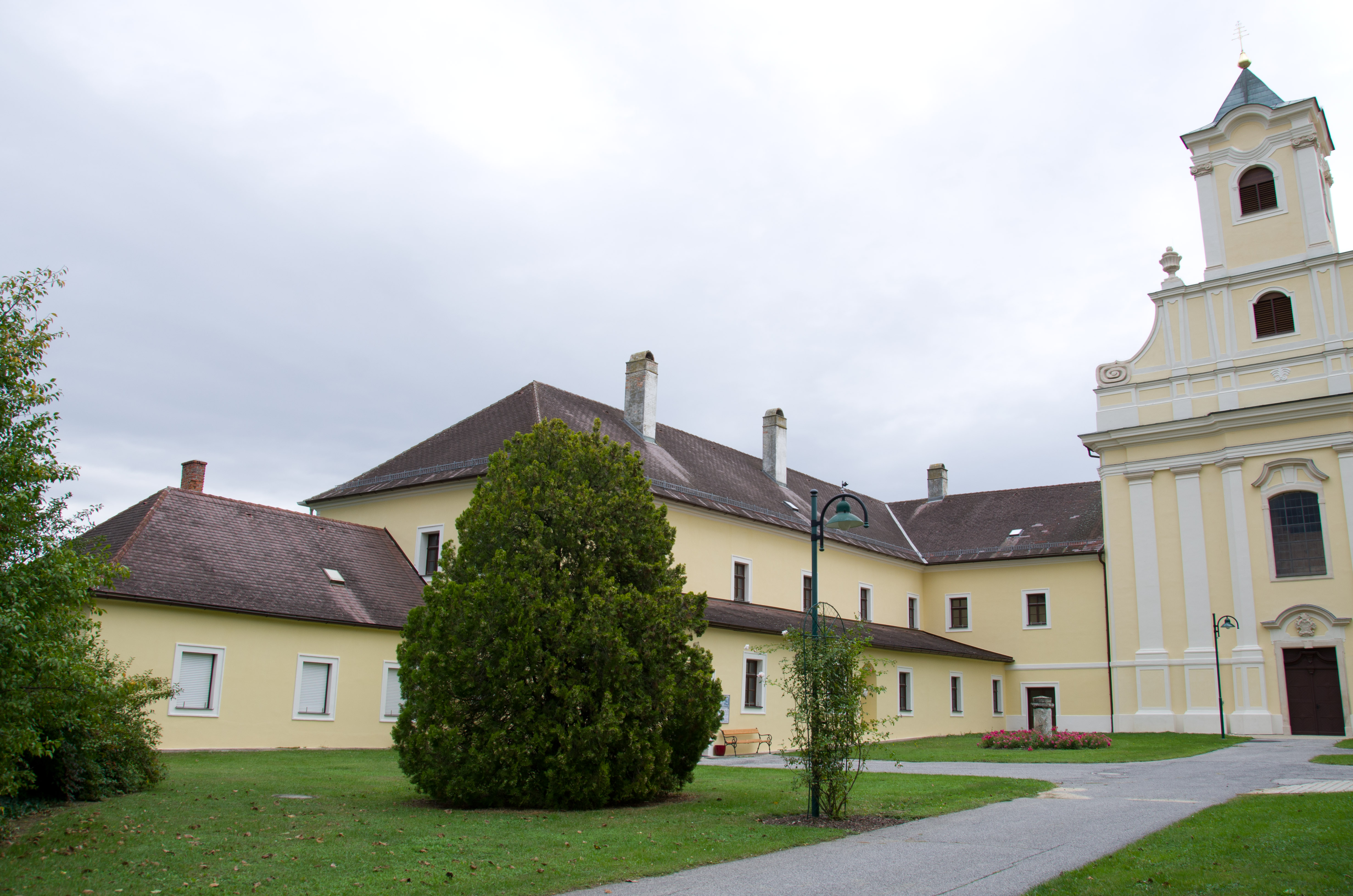 Kath. Pfarrkirche hl. Georg und Mariae Himmelfahrt